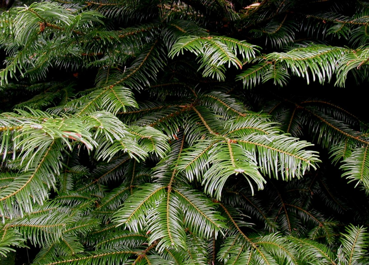 Abies grandis: Needles.